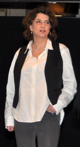 Noémie Lvovsky) à la cérémonie des Prix Lumières